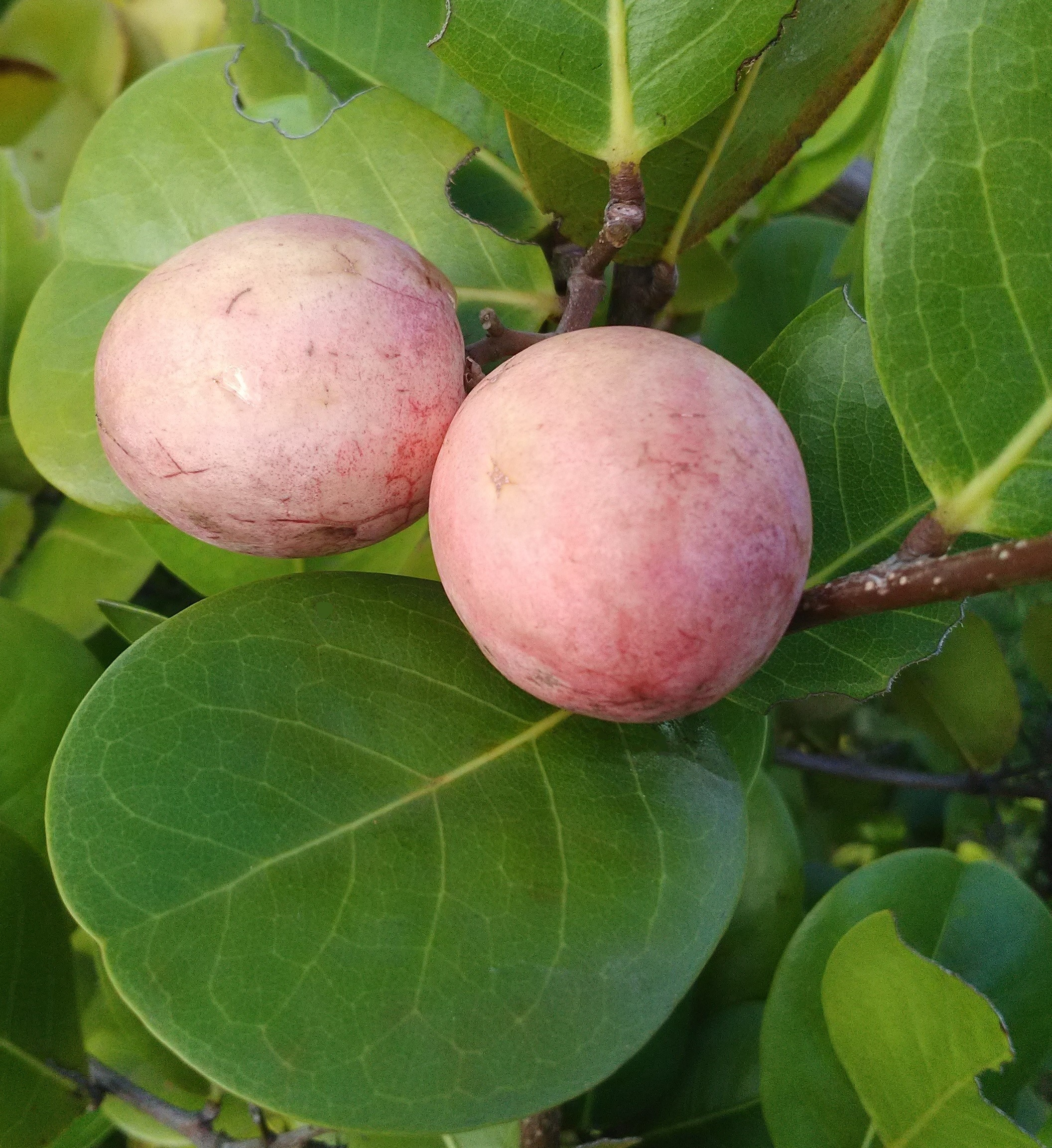 Fruits et feuilles de Chrysobalanus icaco